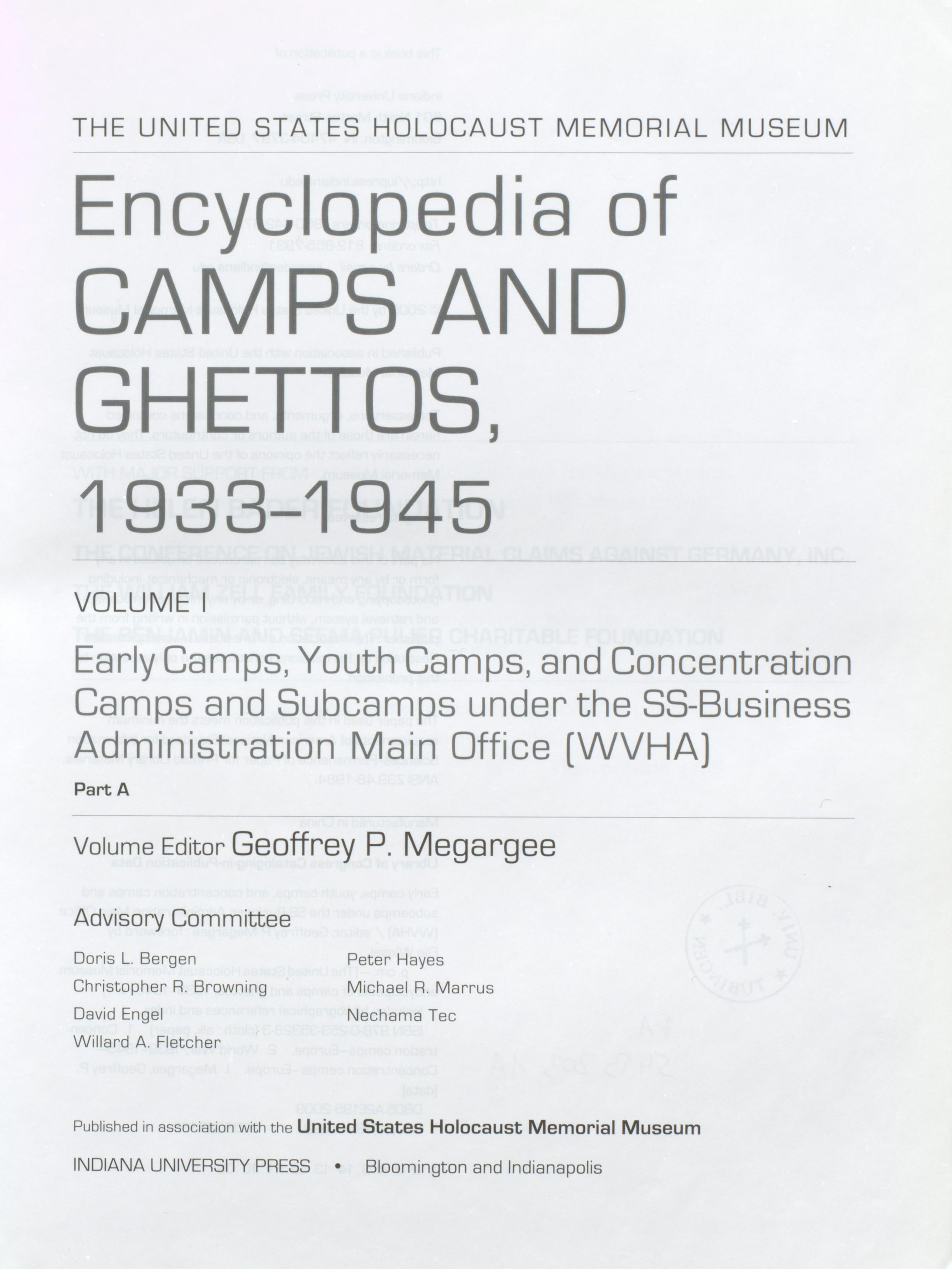 Geoffrey Megargee (Hrsg.): The United States Holocaust Memorial Museum Encyclopedia of Camps and Ghettos, 1933–1945. Band 1: Early Camps, Youth Camps, Concentration Camps and Subcamps under the SS-Business Administration Main Office (WVHA). Indiana University Press, Bloomington 2009, ISBN 978-0-253-35328-3